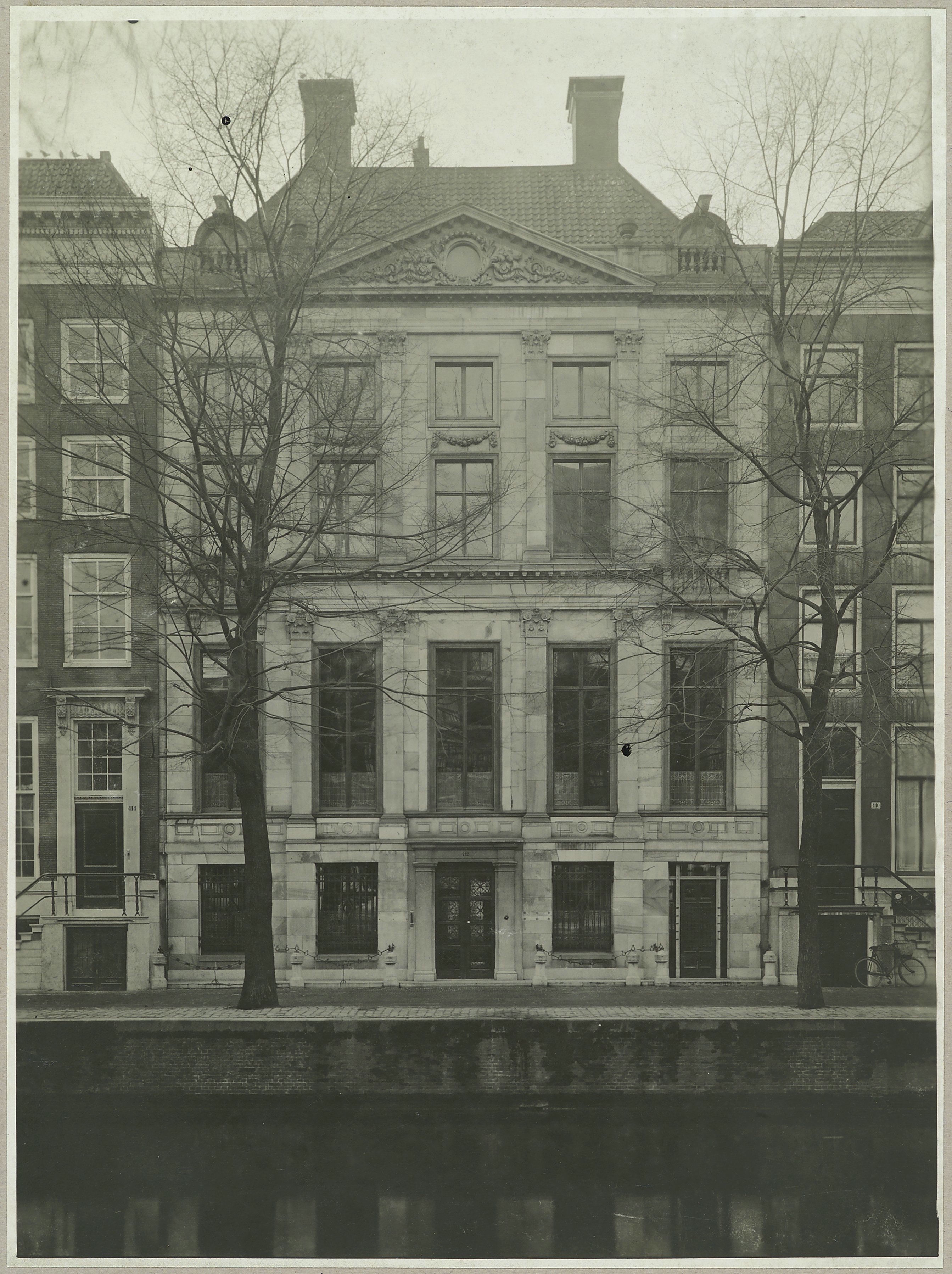 Voorgevel/ Grachtenhuis: Overzicht voorgevel grachtenhuis